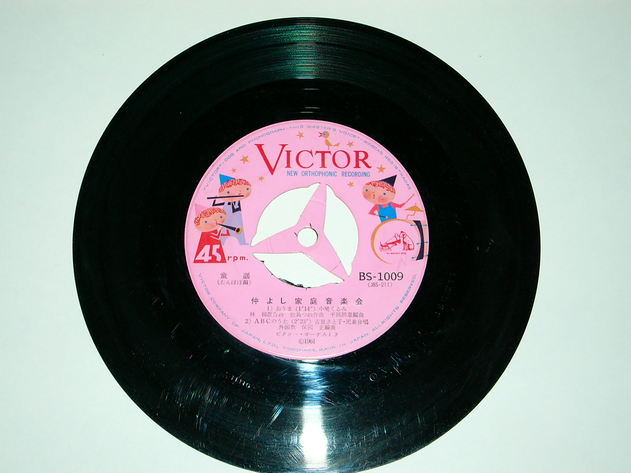 アダプターの不要なシングル盤。必要に応じて中央の三つ葉のような部分を折り取れるようになっている。